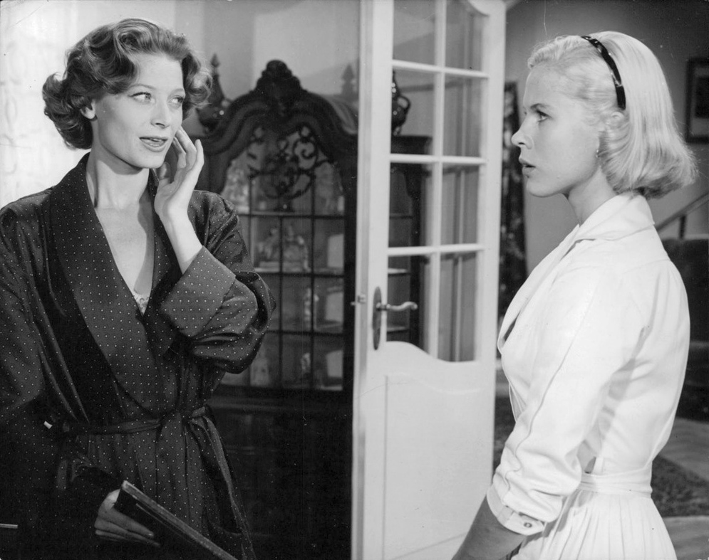 Birgitte Reimer och Bibi Andersson i "Sommarnöje sökes".